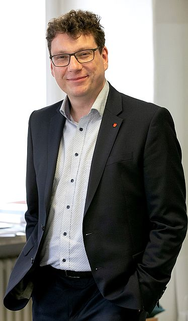 Bibliotheksdirektor Dr. Bernhard Lübbers in der Staatlichen Bibliothek Regensburg (Januar 2020)